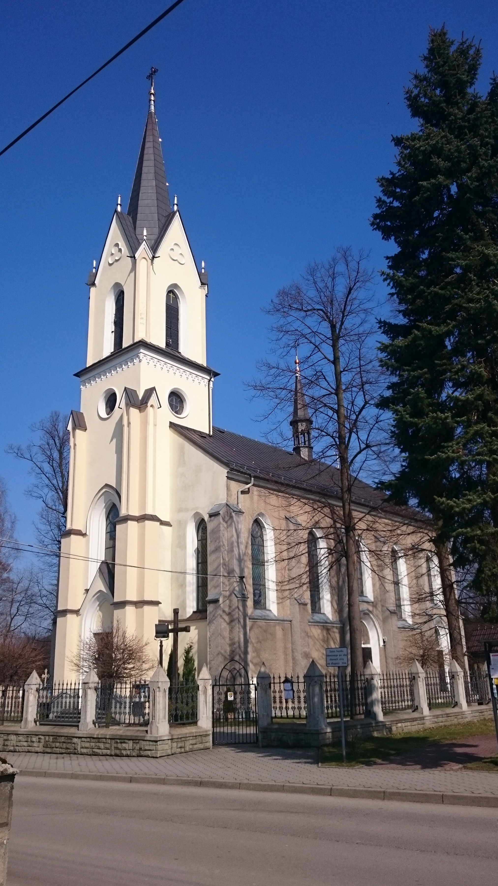 Dankowice, kościół św. Wojciecha